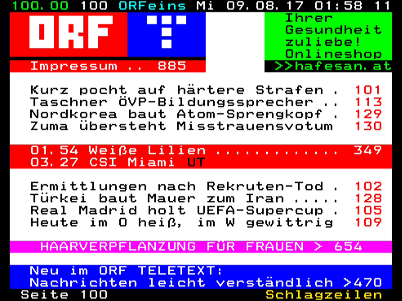 Startseite des ORF-Teletextes